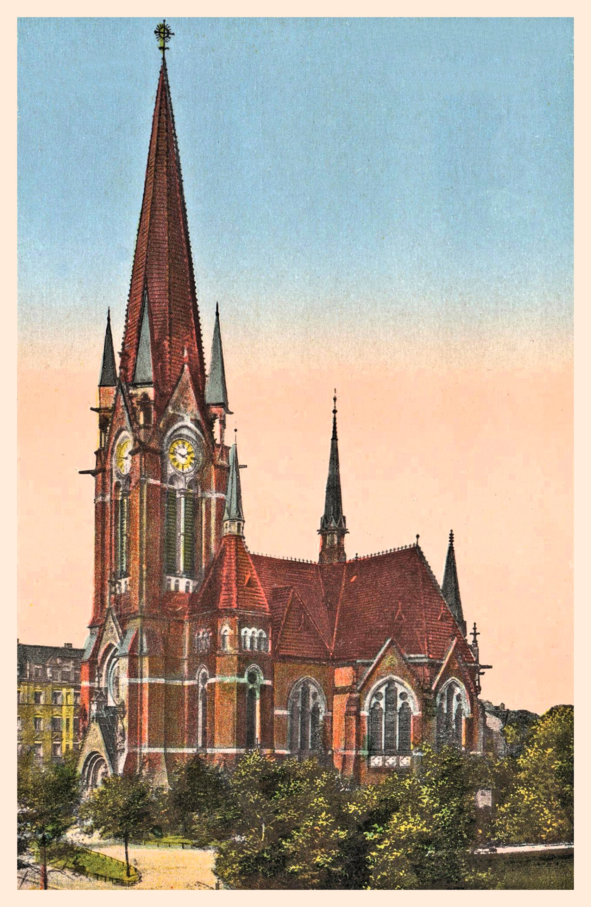 Pauluskirche in Plauen (Vogtl.), ca. 1903